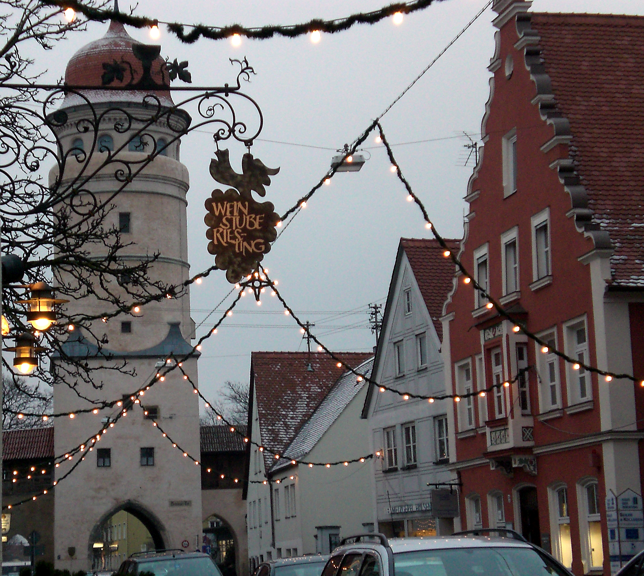 Nördlingen Germany Deininger Tor